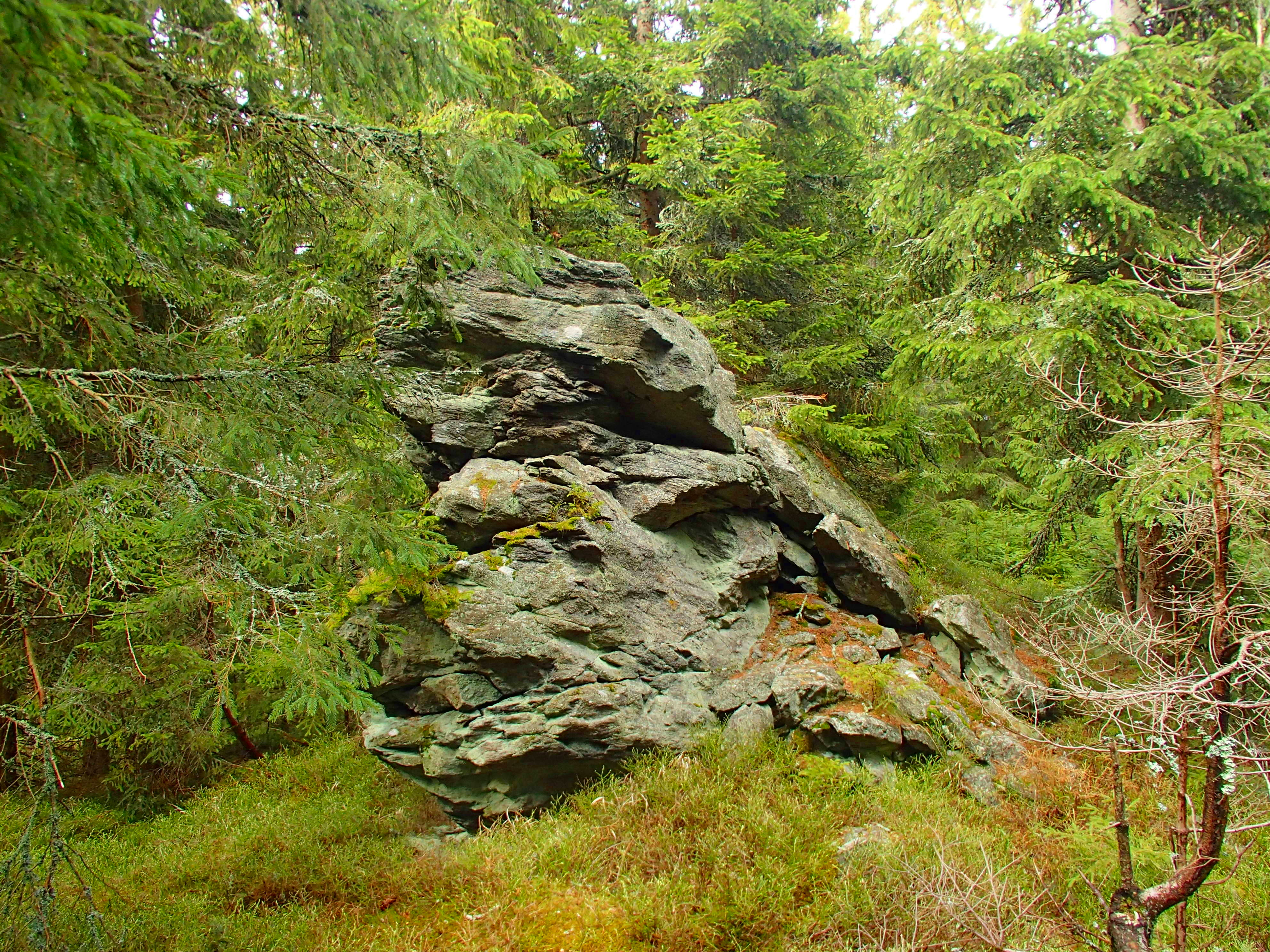 Loupežník (1020 m n. m.)